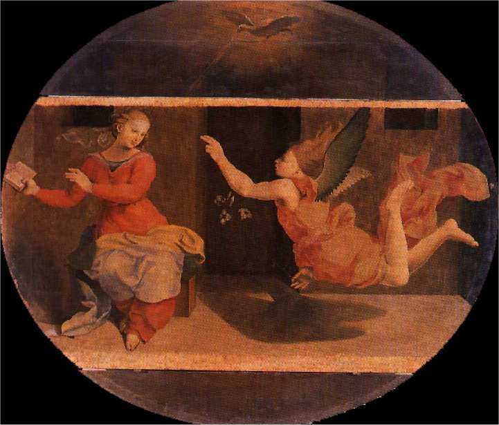 parte del tríptico de San Agostino